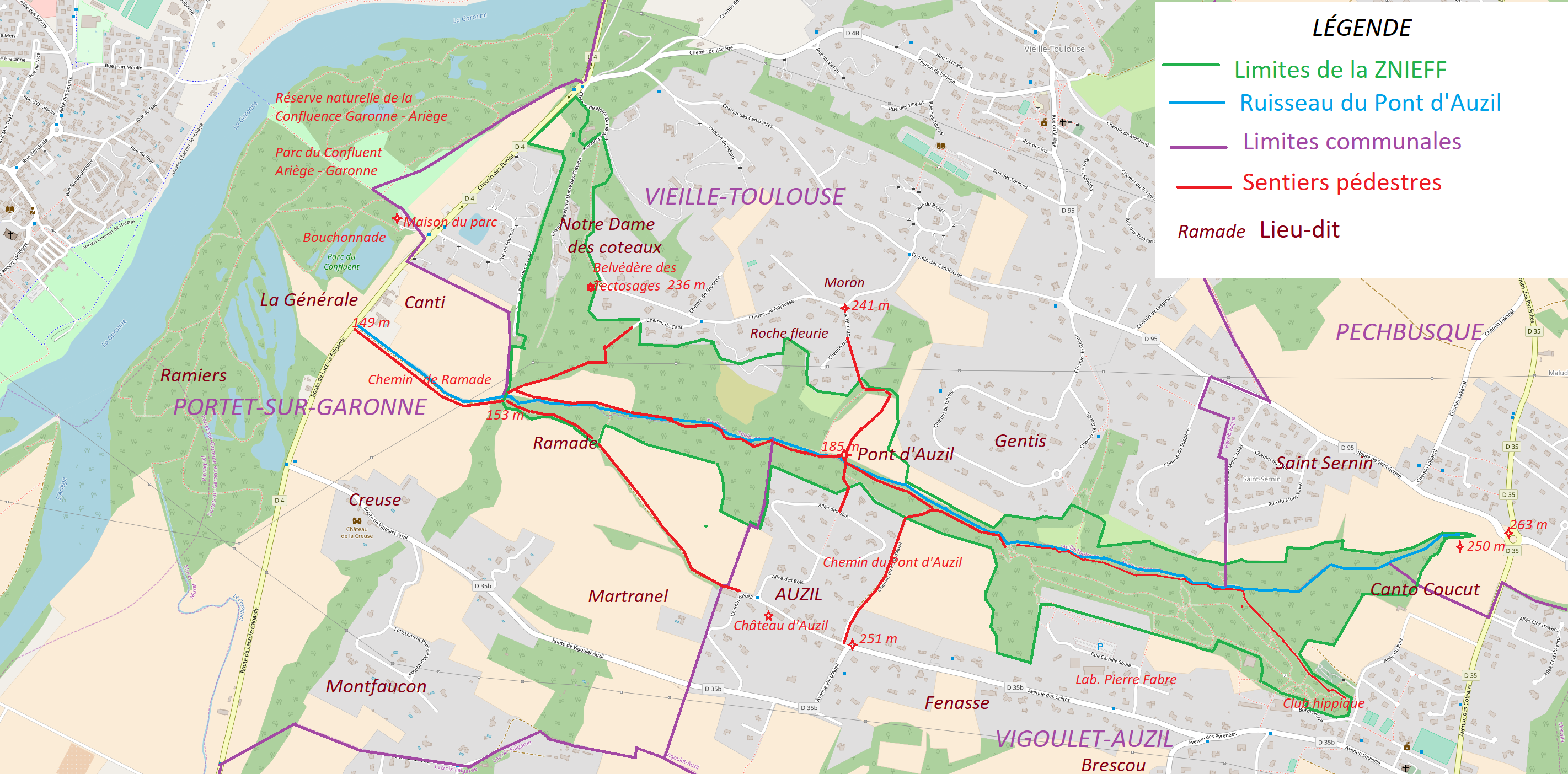 Carte de la zone naturelle d'intérêt écologique, faunistique et floristique (ZNIEFF) du vallon de Ramade, ou du vallon du ruisseau Pont d'Auzil, sur les communes de Vigoulet-Auzil, Pechbusque, Vieille-Toulouse et Portet-sur-Garonne. Carte fournie selon la note descriptive établie par Lionel Belhacène